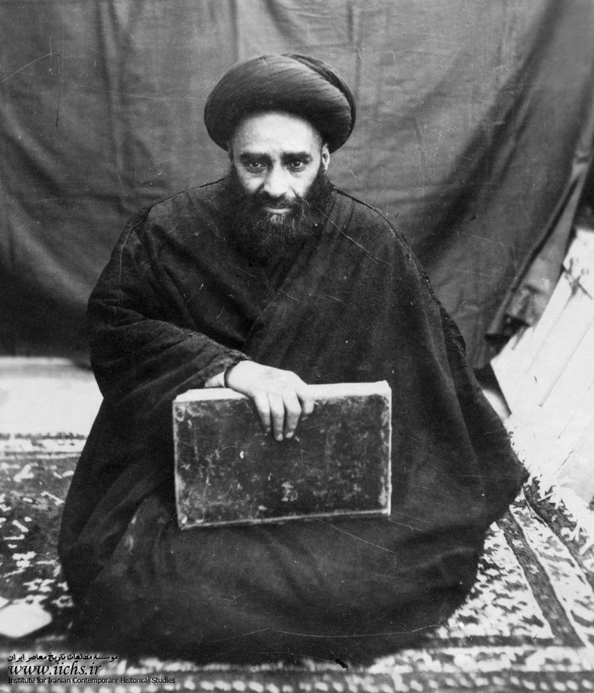 Ayatollah Sayyid Hujjat Hussain Kuh Kamari